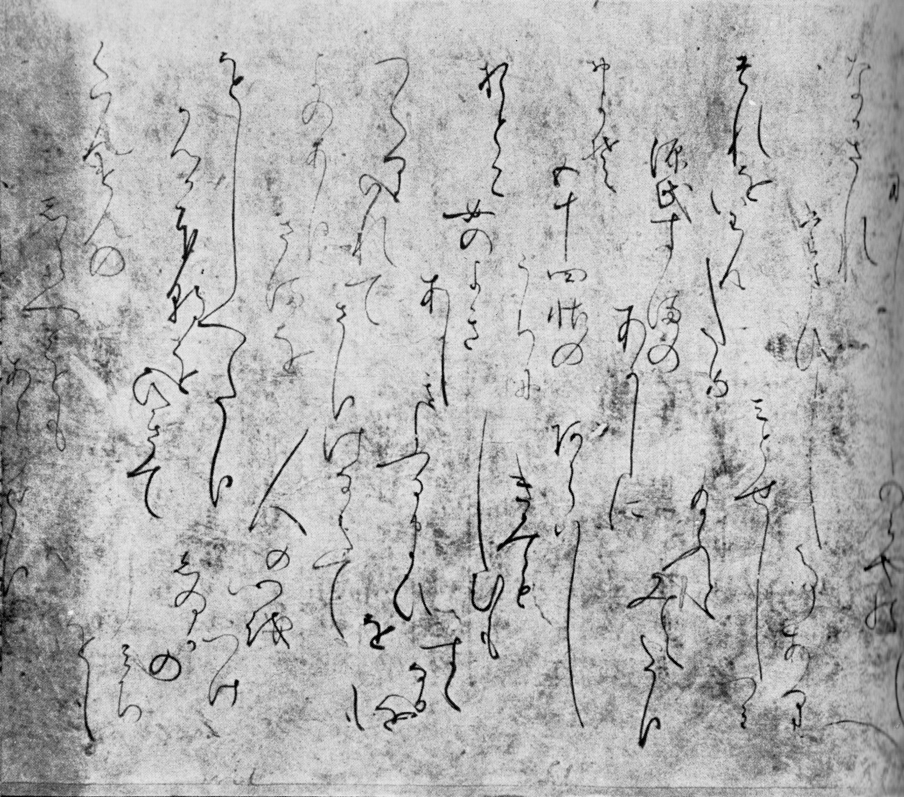 Schrift zum Genji-Monogatari